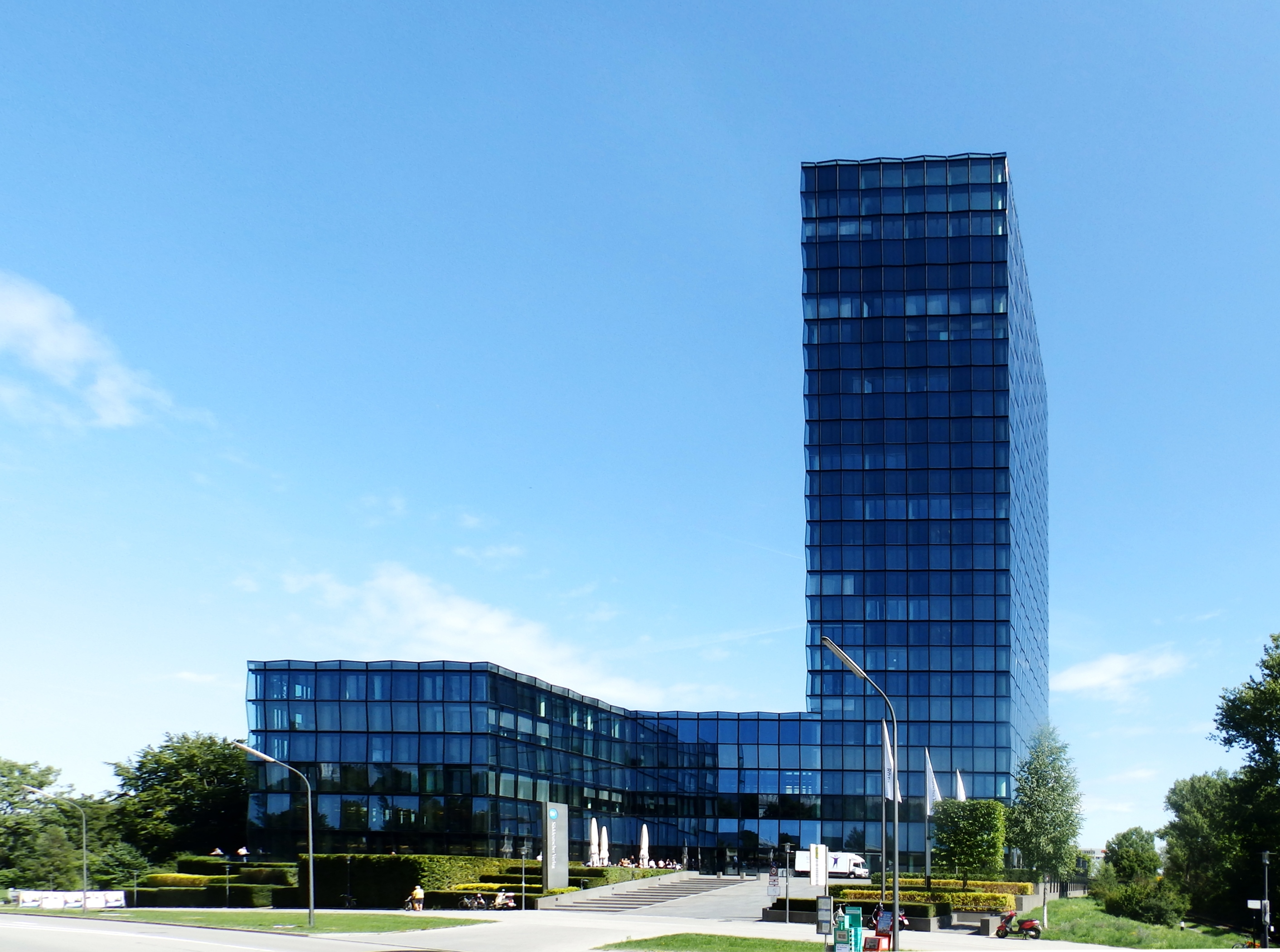 Komplettansicht des Gebäude des Süddeutsche-Verlags vom Westen